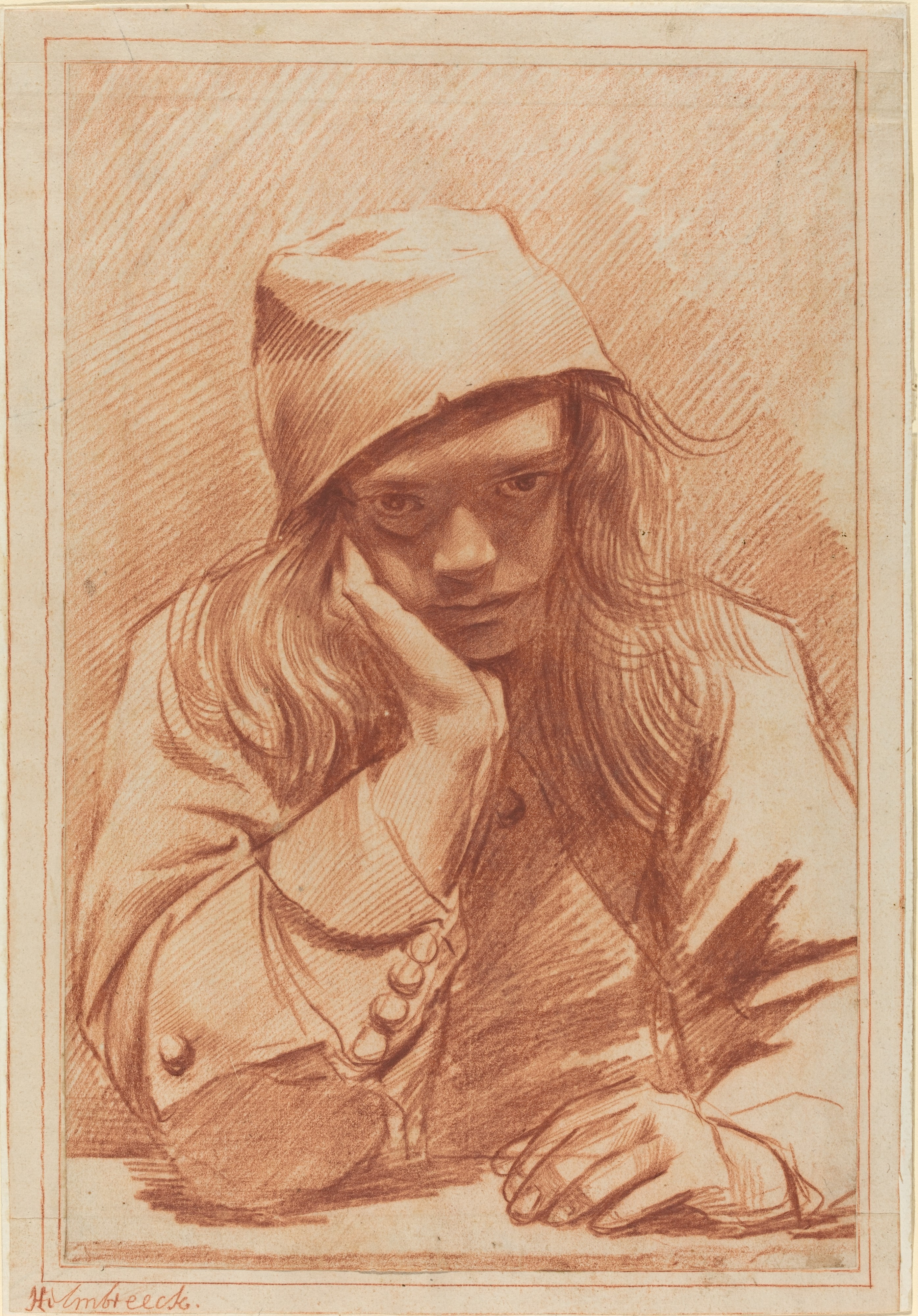 Self-portrait